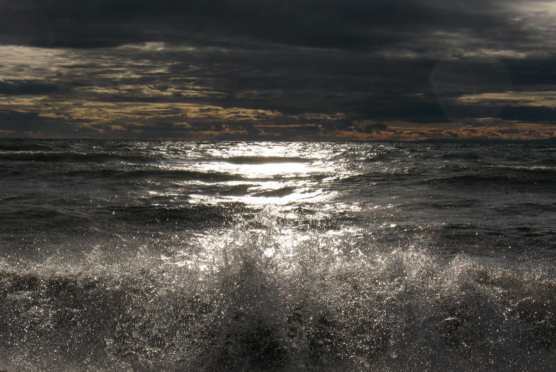 Байкал